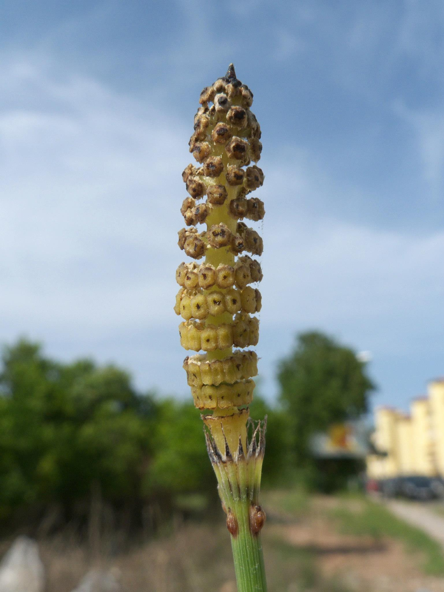 Estróbilo de Equisetum ramosissimum. Moncofar, Castellón, España.